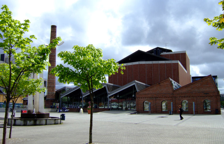 Sandnes culture center